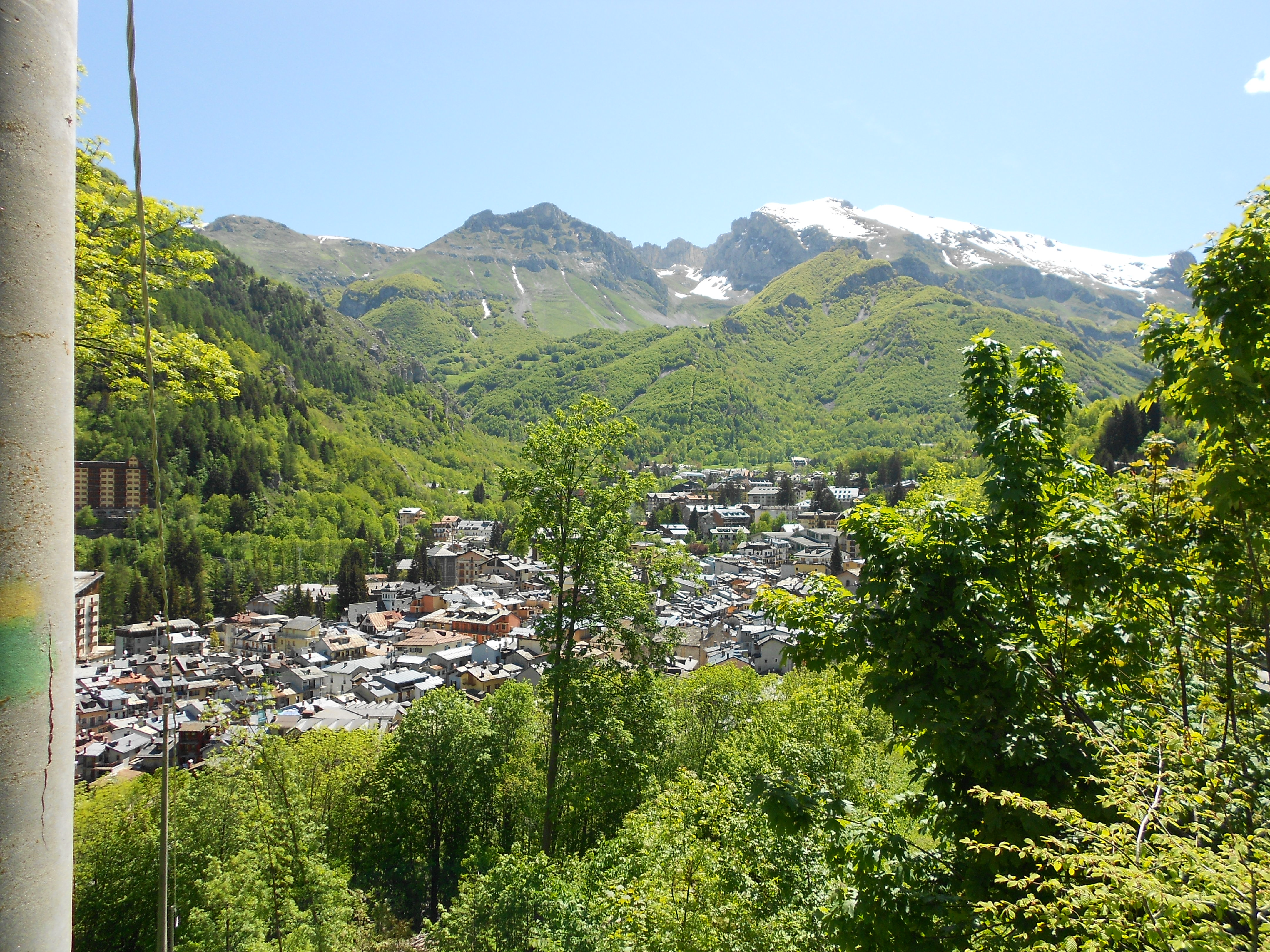 vista di Limone in periodo primaverile